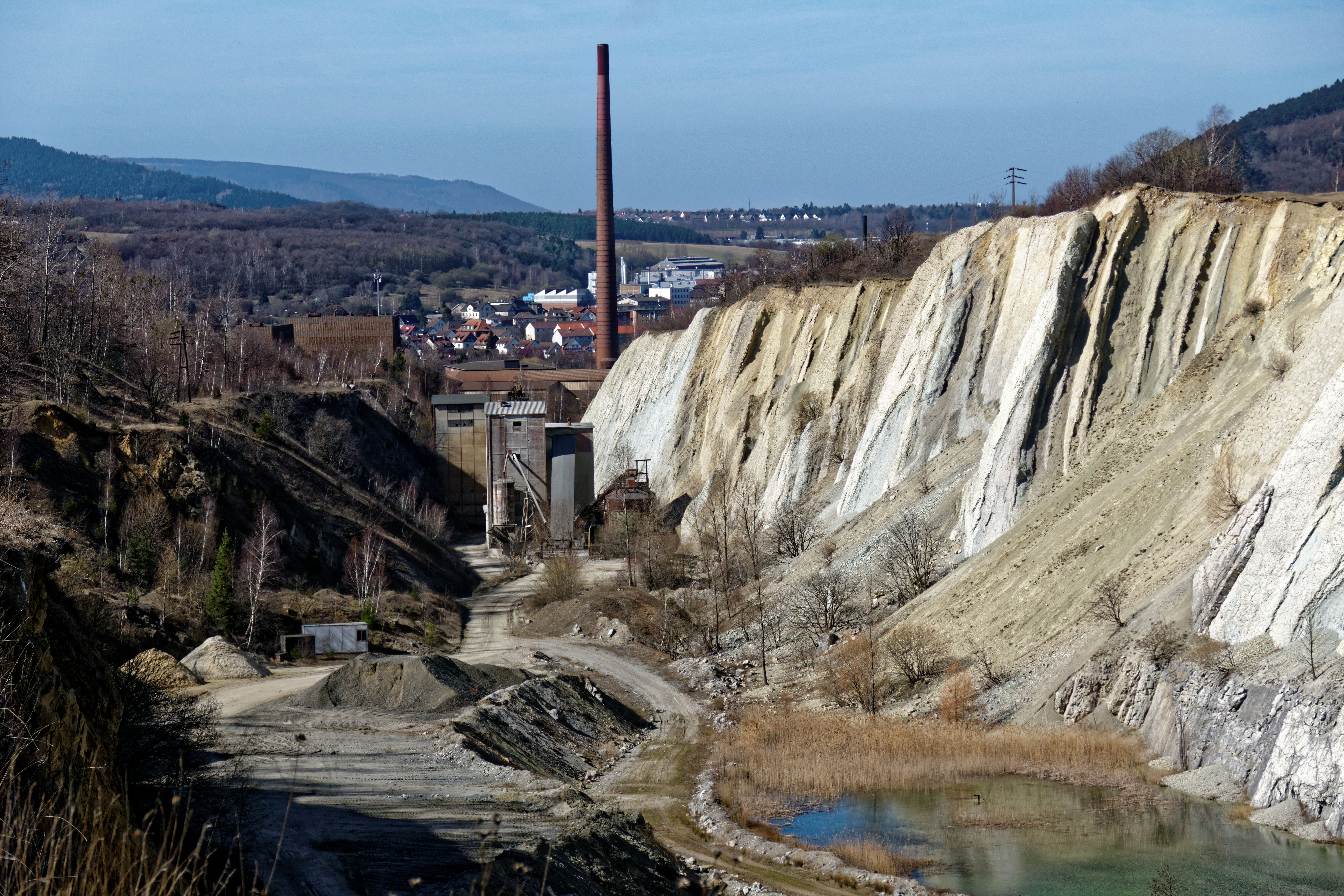 Blick zum westlichen Ende des Langenberg-Steinbruches